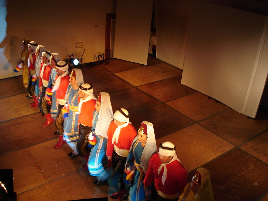 Grupo de dabke club sirio santiago chile.